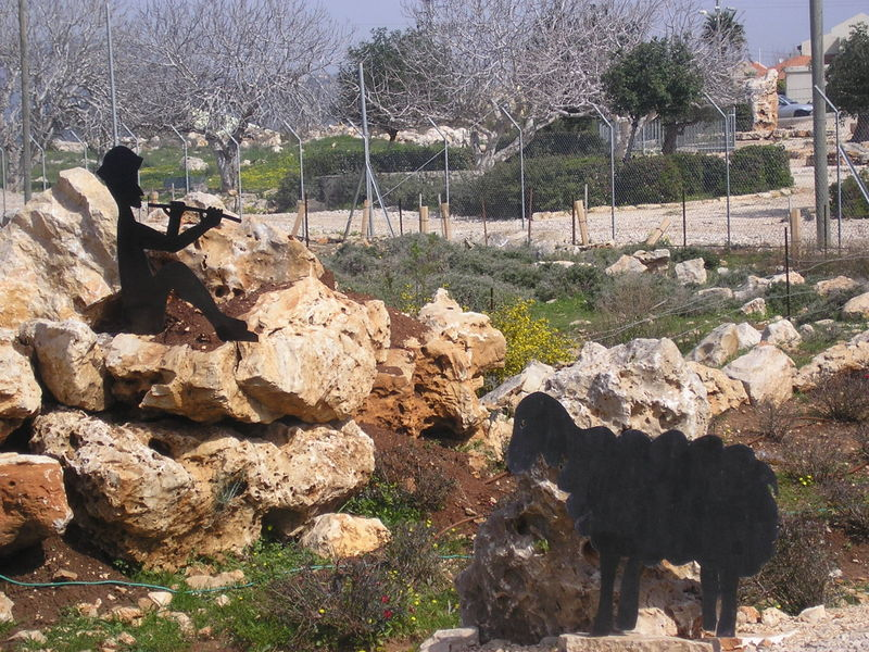 הרועה הבודד. פסל סביבתי בכניסה לאשחר (פרט). יצירתו של האמן המקומי אביגדור בר יוסף. "The Shepard", an environmental statue in the entrance to Eschar, Israel, made by local artist Avigdor Bar-Yosef